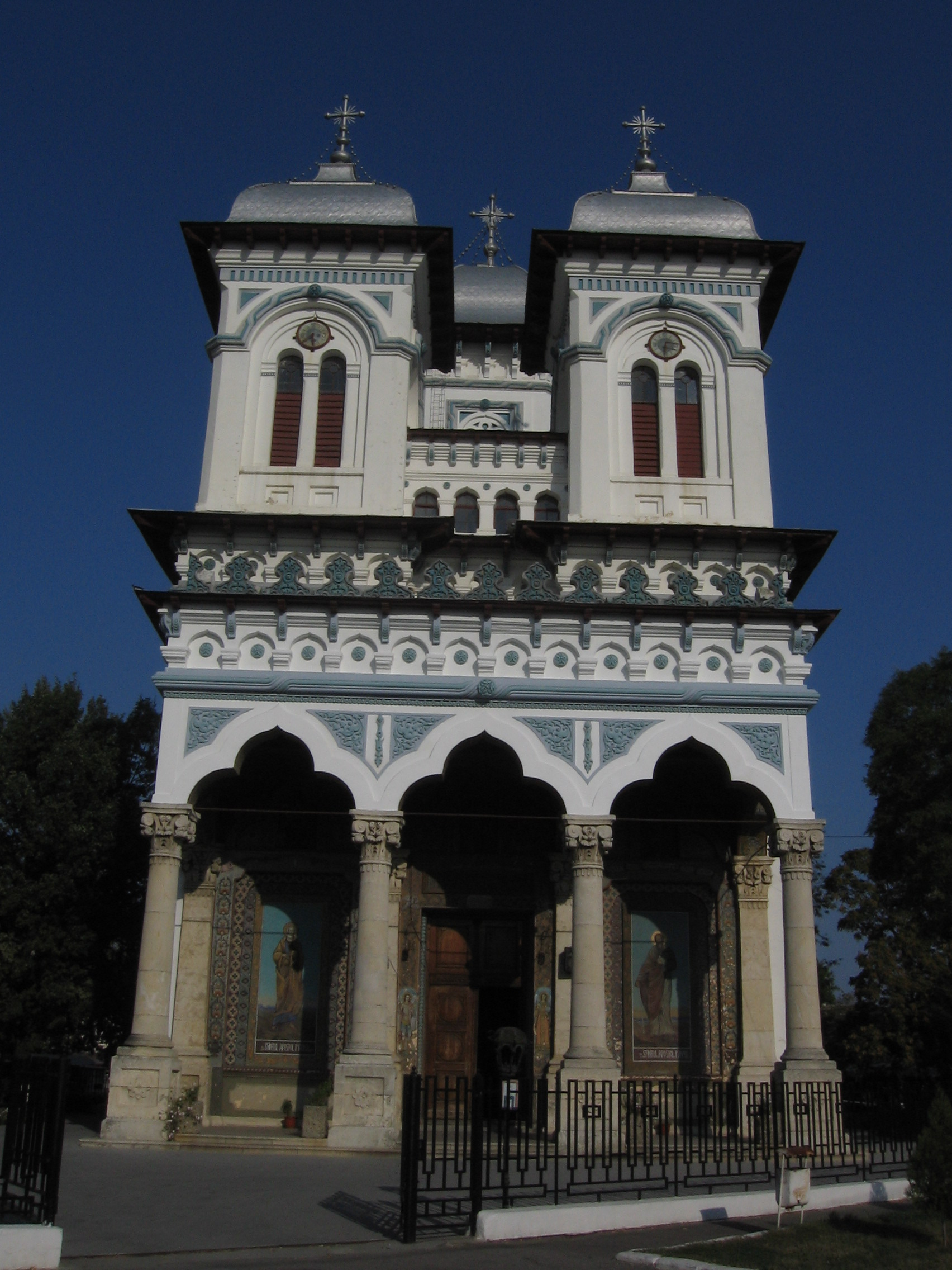 Construita in 1869-1898; adaposteste mormantul domnitorului Alexandru Dimitrie Ghica, intemeietorul orasului (1834); picturi de Luchian.